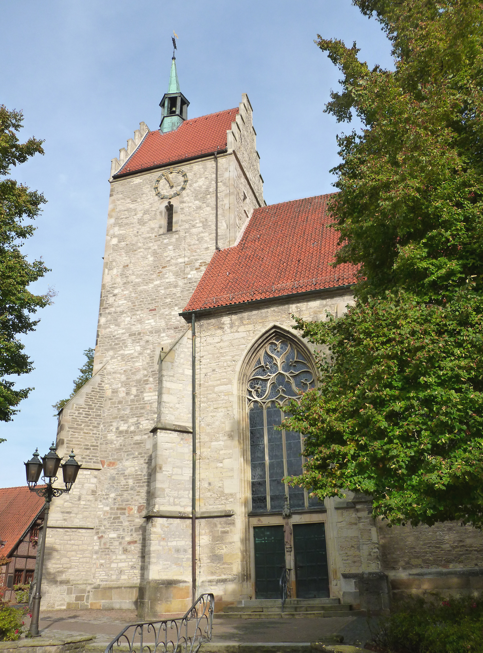 Kath. Pfarrkirche St. Martinus in Wessum This is a photograph of an architectural monument.It is on the list of cultural monuments of Ahaus